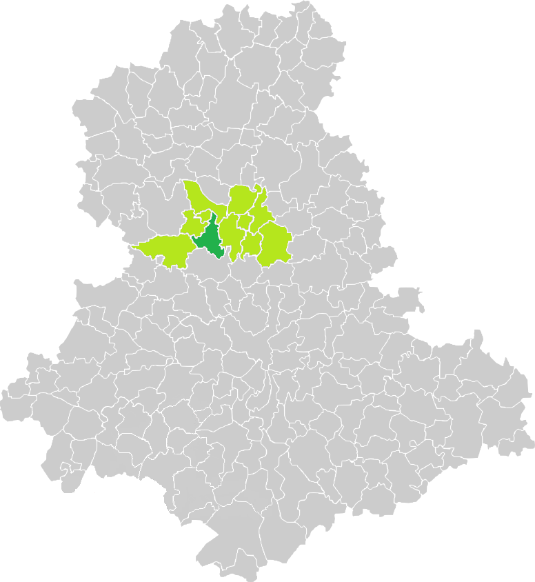 Carte de situation de la commune de Chamboret (en vert foncé) dans le votre Canton (en vert clair) sur une carte des communes de la Haute-Vienne